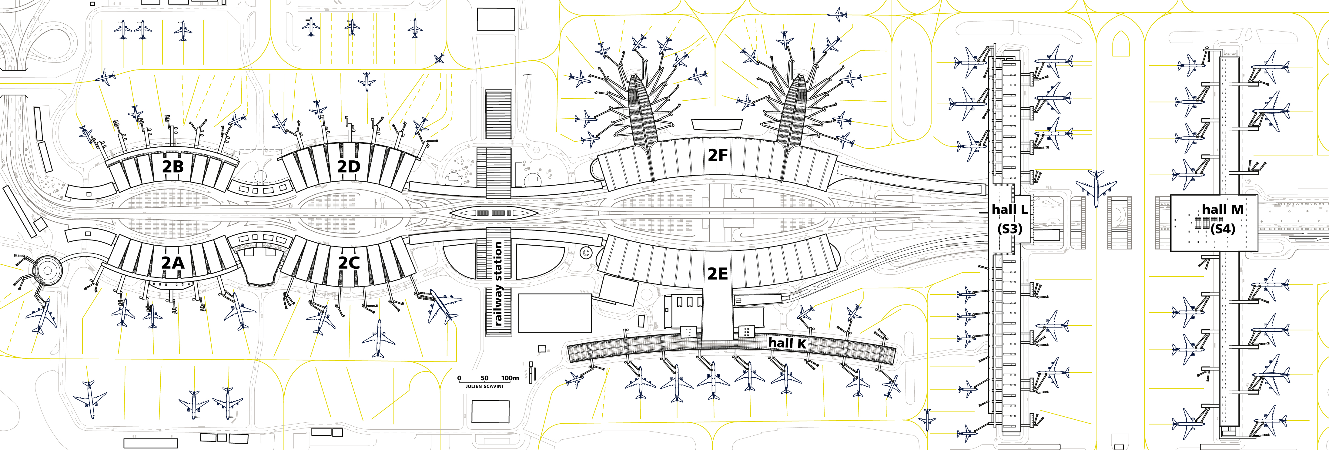 Plan de toiture des installations aéroportuaires du terminal 2 de l'aéroport Paris Charles-de-Gaulle, état 2017